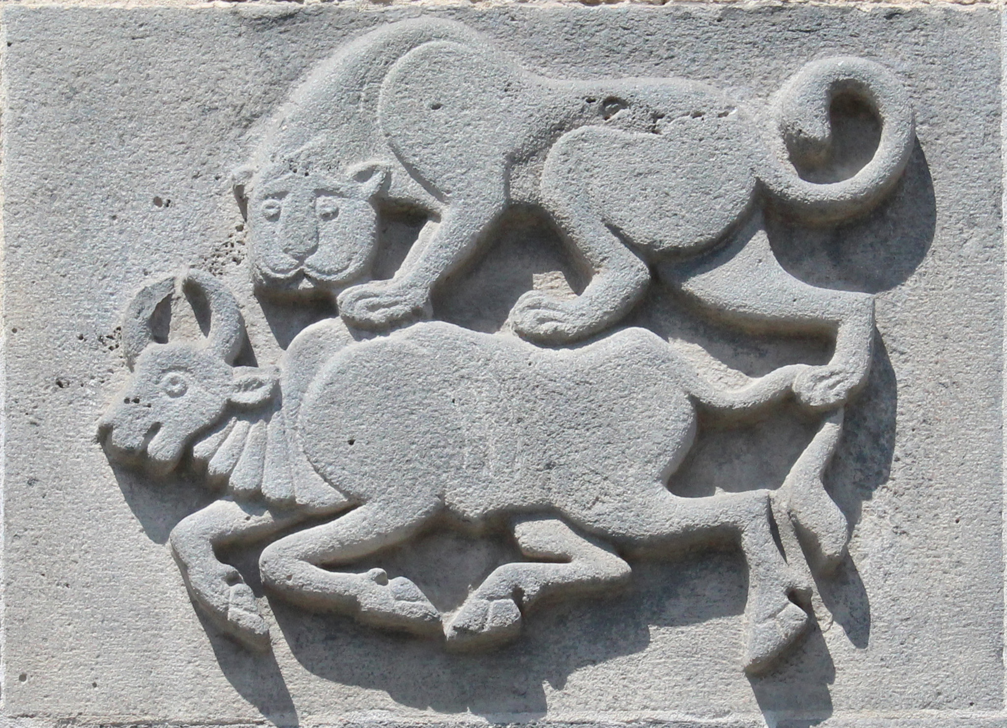 Diyarbakır Ulu Cami giriş kapısı süslemesi